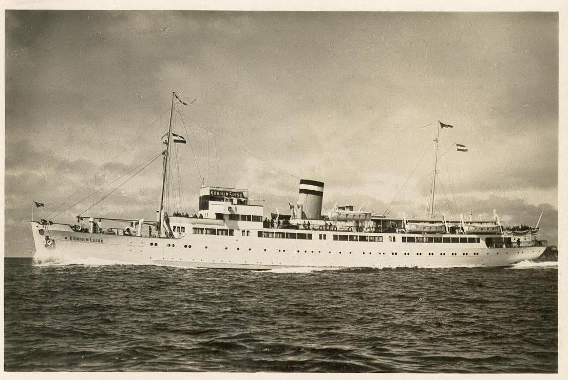 Das Seebäderschiff Königin Luise (II))